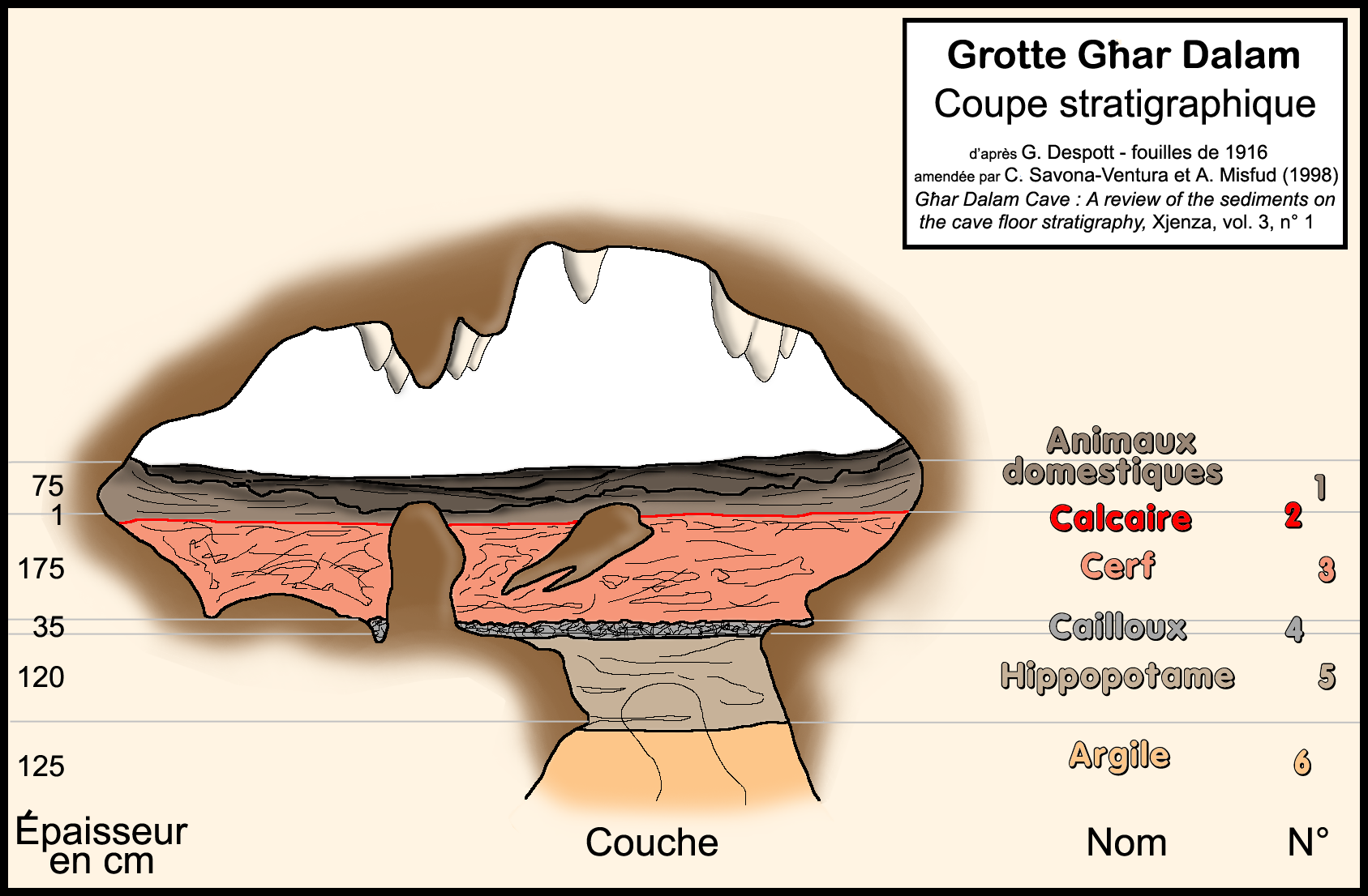 coupe stratigraphique de la grotte de Ghar Dalam à Malte